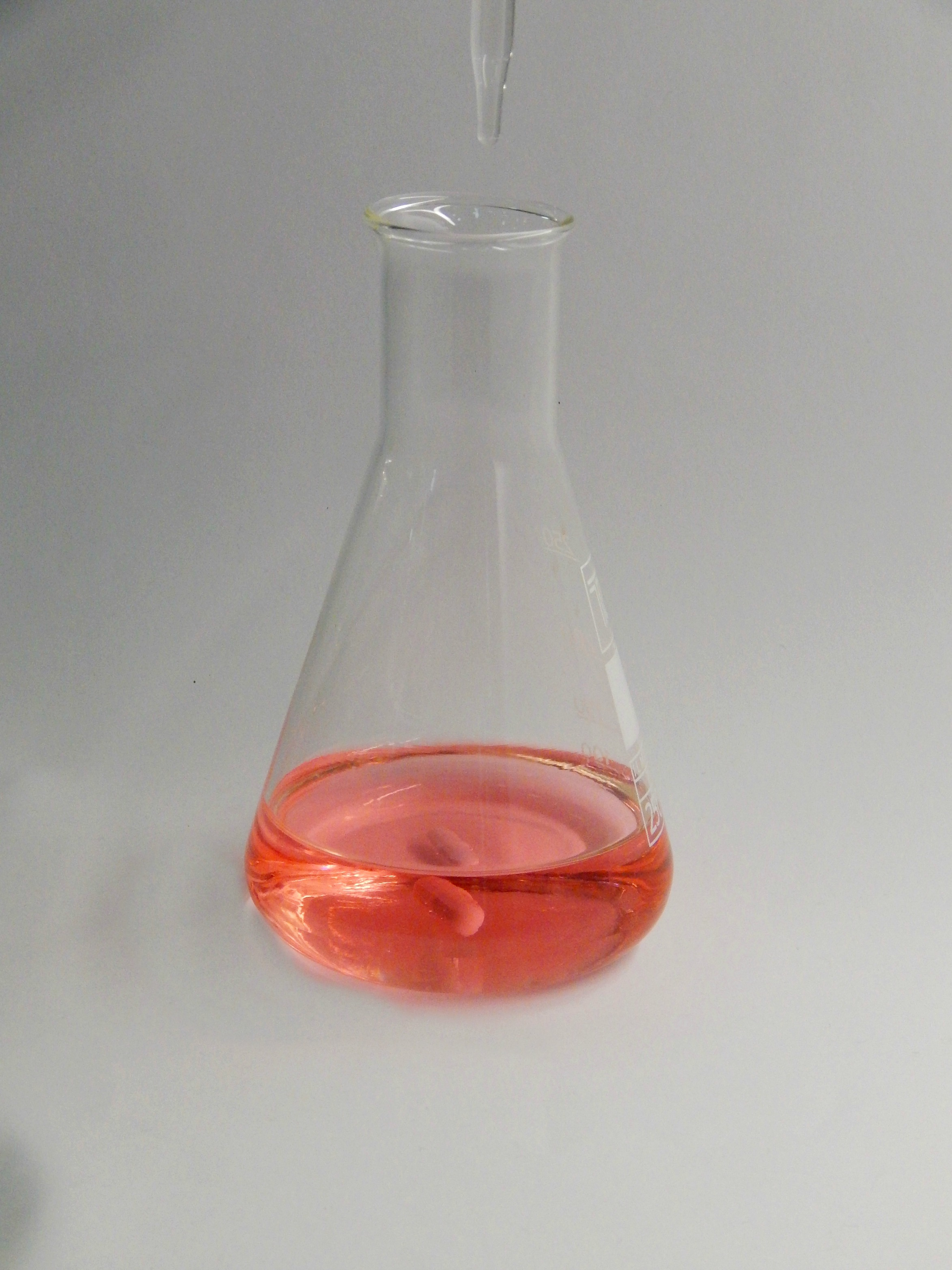 Srpski (latinica): Acidobazna titracija uz metil oranz, titrovan rastvor natrijum hidroksida.